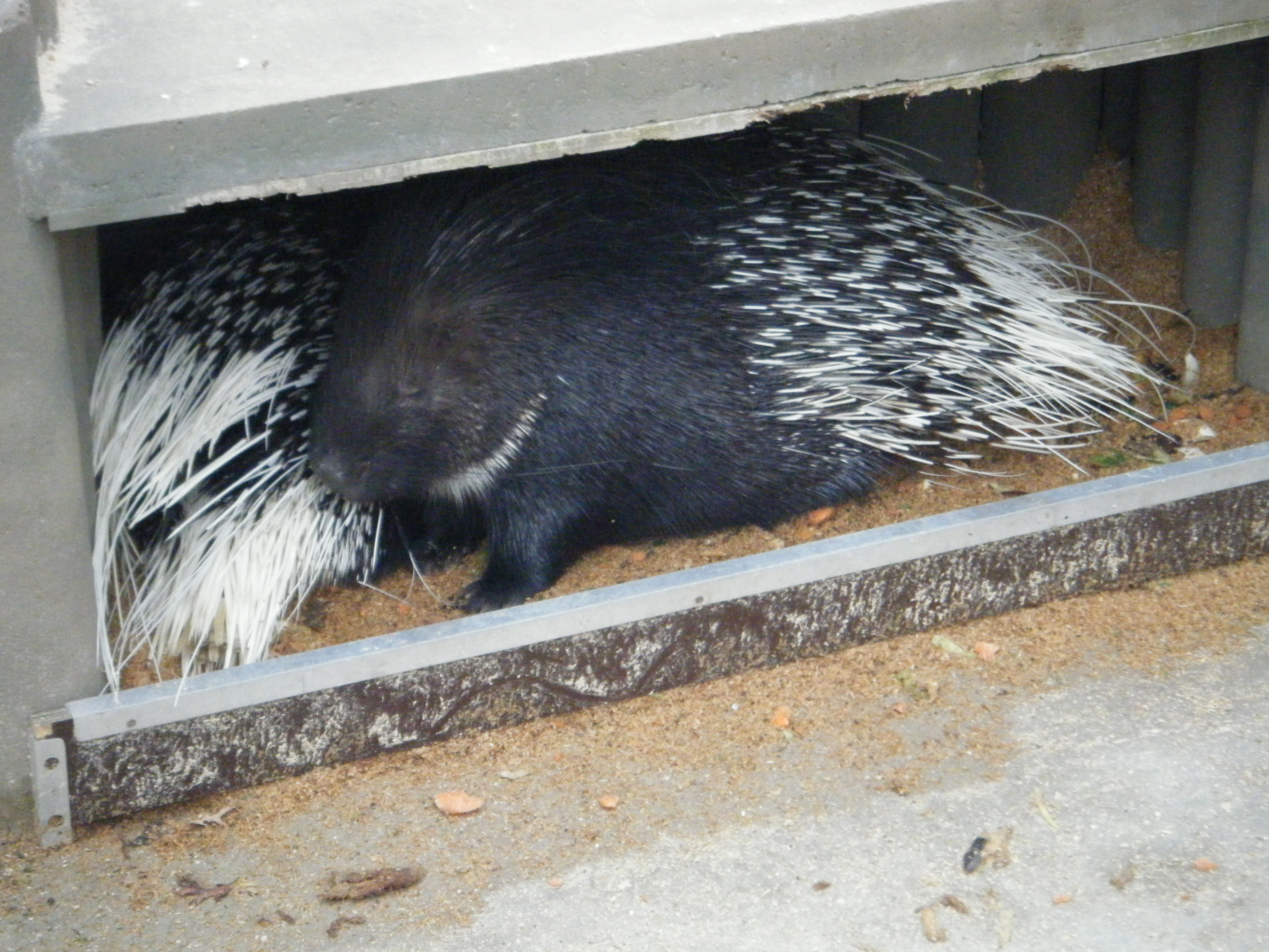 Porc épic de la ménagerie du jardin des plantes. Paris.